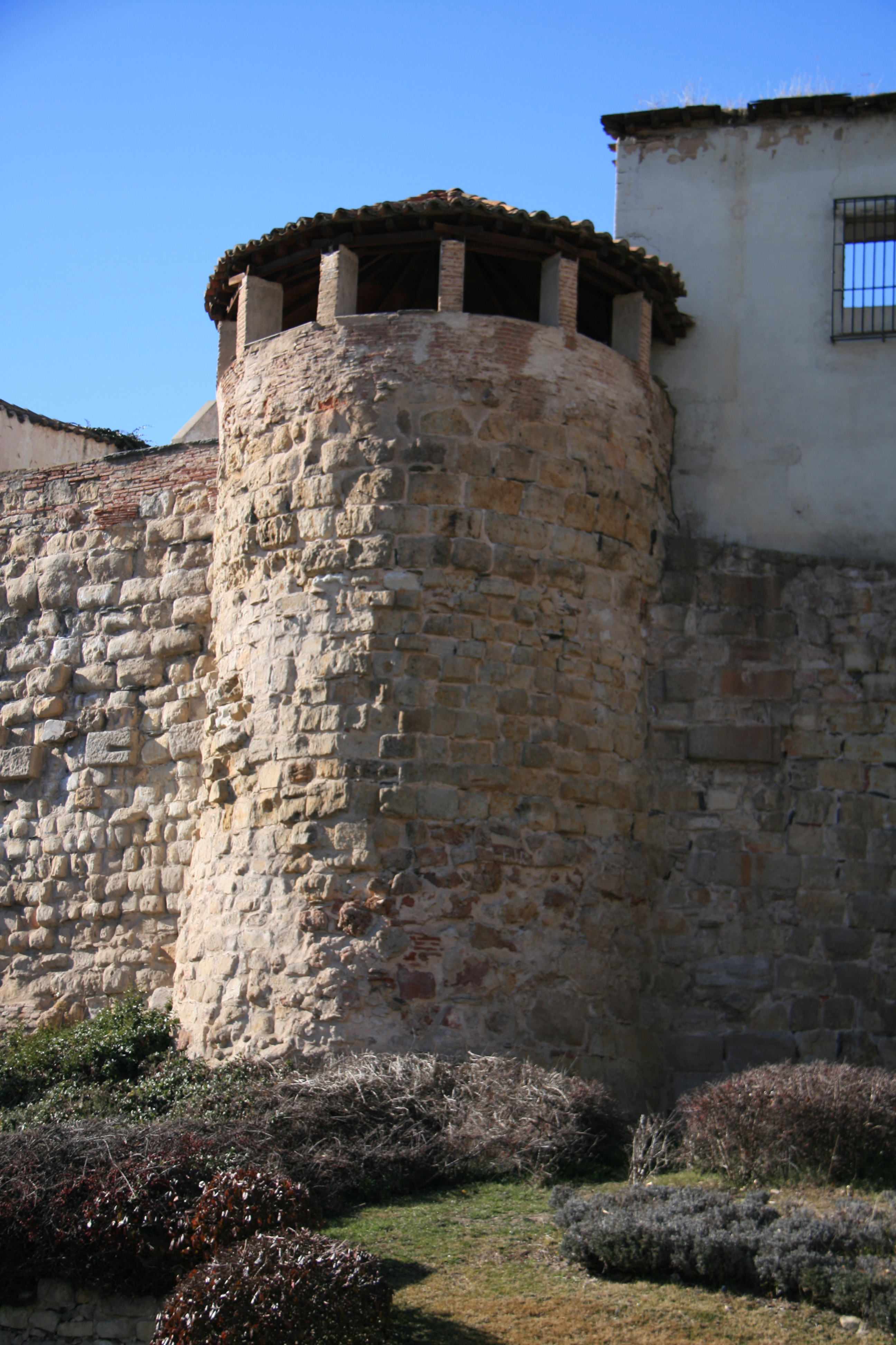 Torre en la muralla de Salamanca